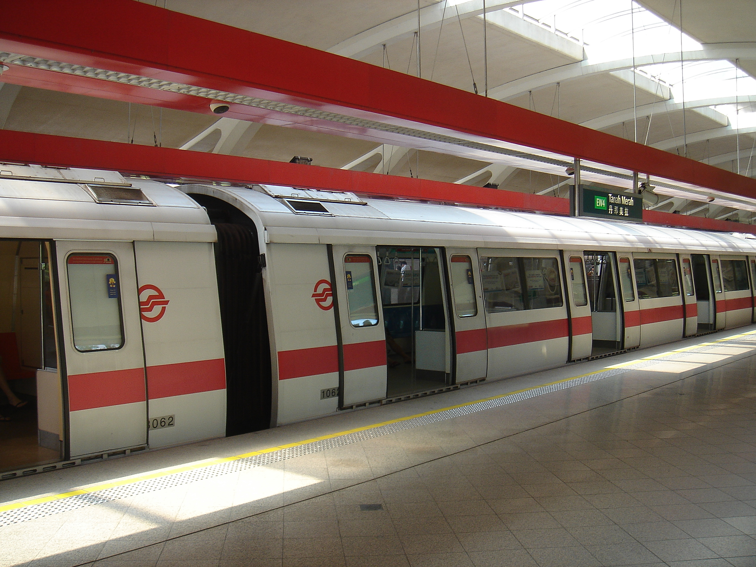 C151 Kawasaki Heavy Industries at Tanah Merah MRT Station, Singapore.